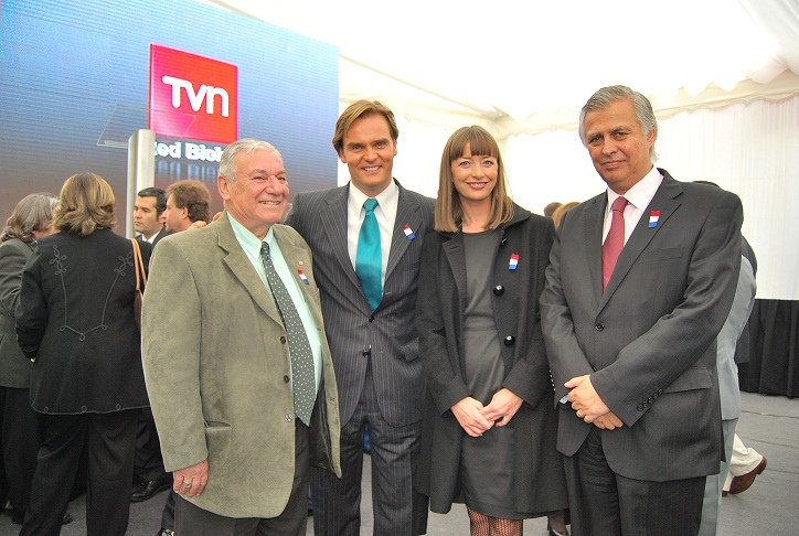 TVN inaugura centro regional en Talcahuano